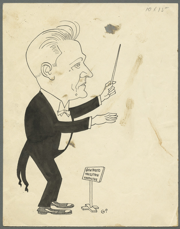 Juhan Aavik